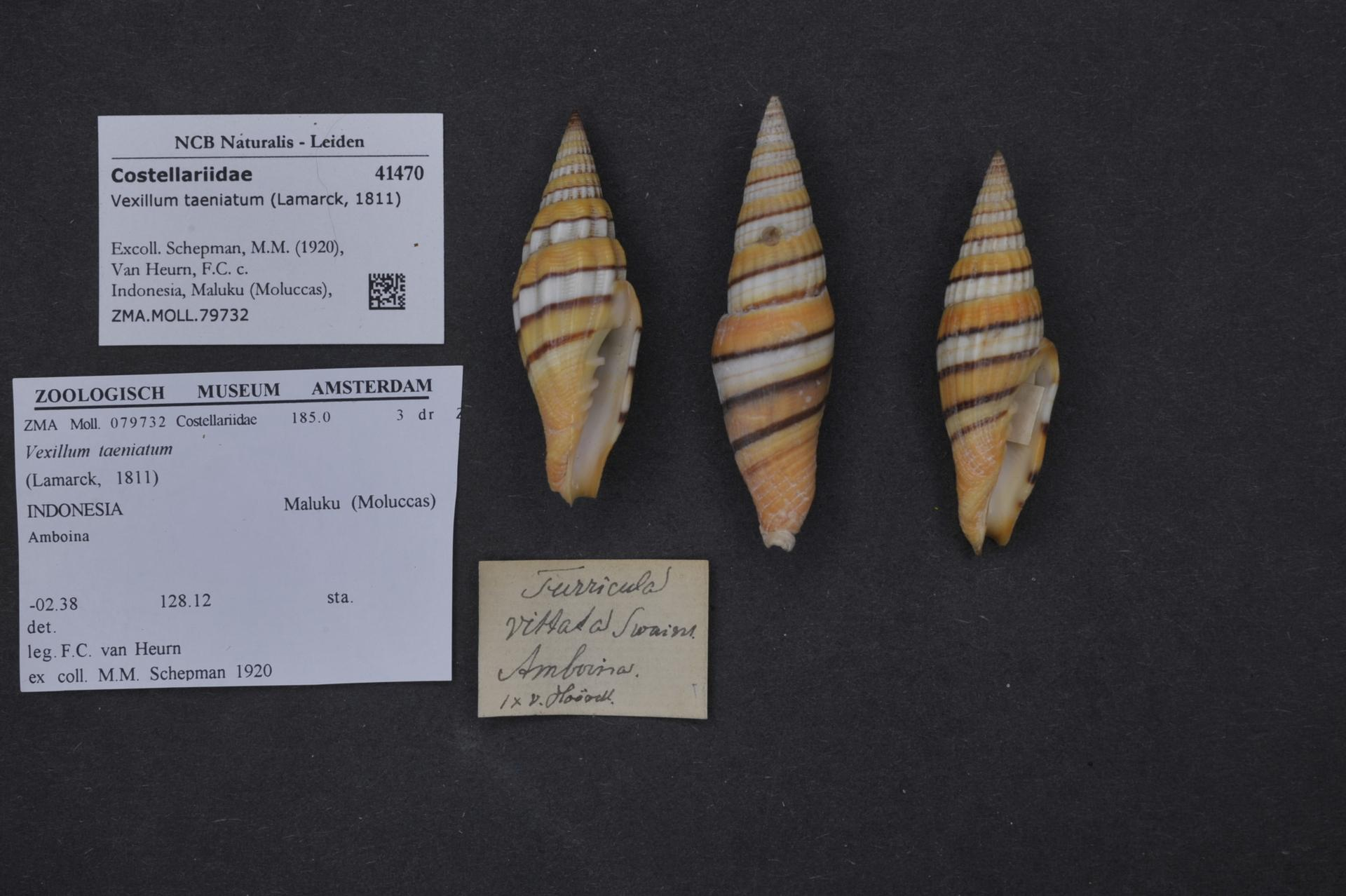 Vexillum taeniatum (Lamarck, 1811)